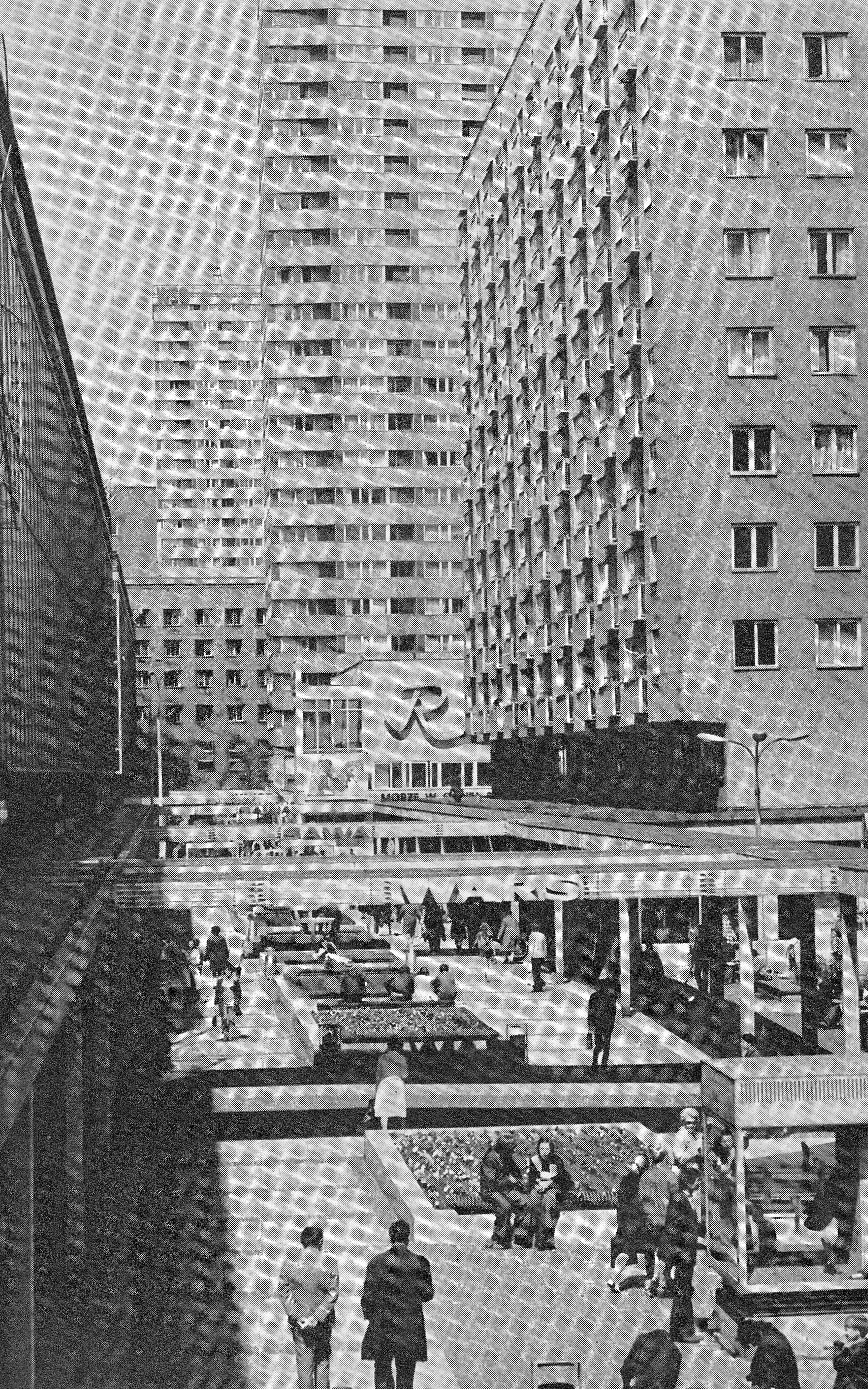 Pasaż na tyłach Domów Towarowych Centrum (późniejszy pasaż Wiecha)